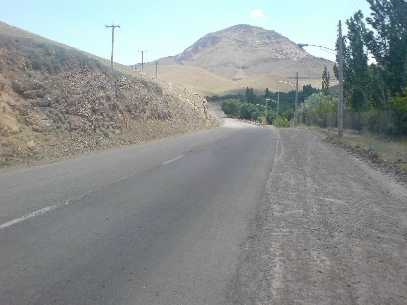 کوه علی خورنده